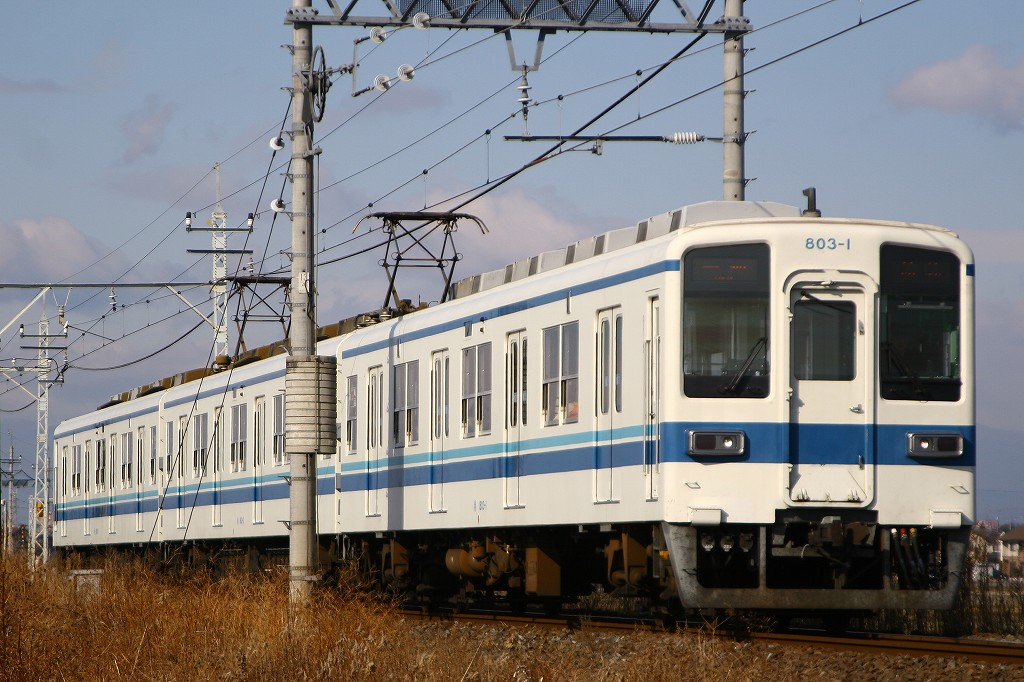 東武800系803Fです。